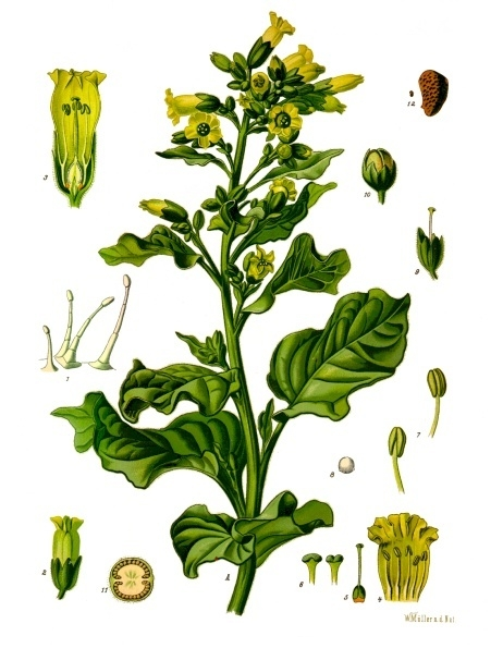 Bauern-Tabak. A blühende Pflanze in natürl. Grösse; 1 Behaarung, vergrössert; 2 Blüthe, etwas vergrössert; 3 dieselbe im Längsschnitt, stärker vergrössert; 4 aufgeschnittene Krone, desgl.; 5 Stempel, desgl.; 6 oberer Theil des Griffels mit Narbe, desgl.; 7 Staubgefässe, desgl.; 8 Pollen unter Wasser, desgl.; 9 abgeblühte Blüthe, desgl.; 10 Frucht, etwas vergrössert; 11 dieselbe im Querschnitt, stärker vergrössert; 12 Same, natürl. Grösse und vergrössert.